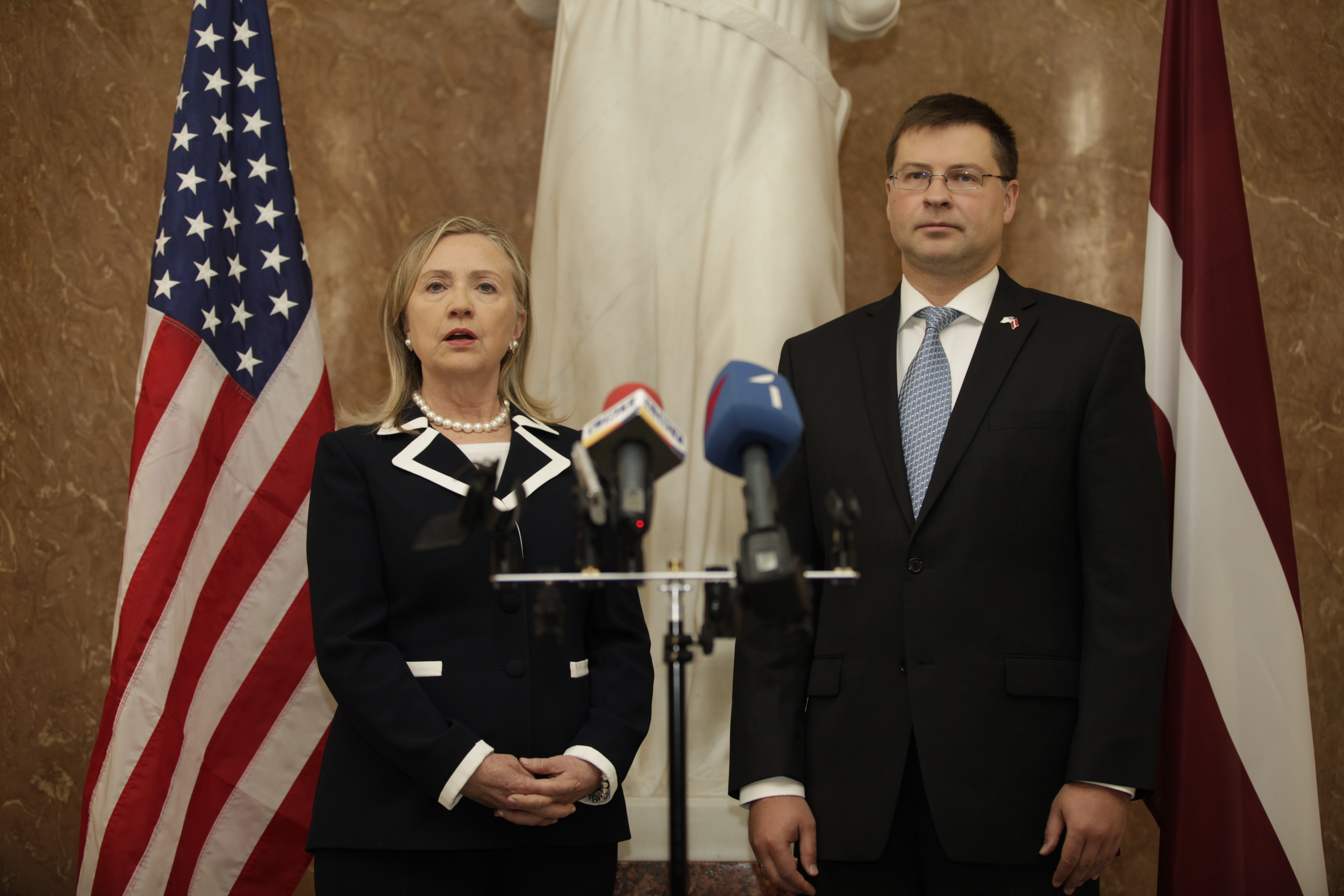 Foto: Toms Norde / Valsts kanceleja